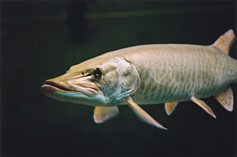 Brochet au Parc Aquarium du Québec (ville de Québec, Québec, Canada); Northern pike at the Parc Aquarium du Québec (Quebec city, Quebec, Canada)